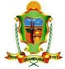 Brasão do Município de Iranduba